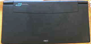 NEC Mobile Gear MC-MK32。大変解像度が低く低品質な画像のため、より高品質な画像をお持ちの方が居られましたら差し替えていただければと思います。